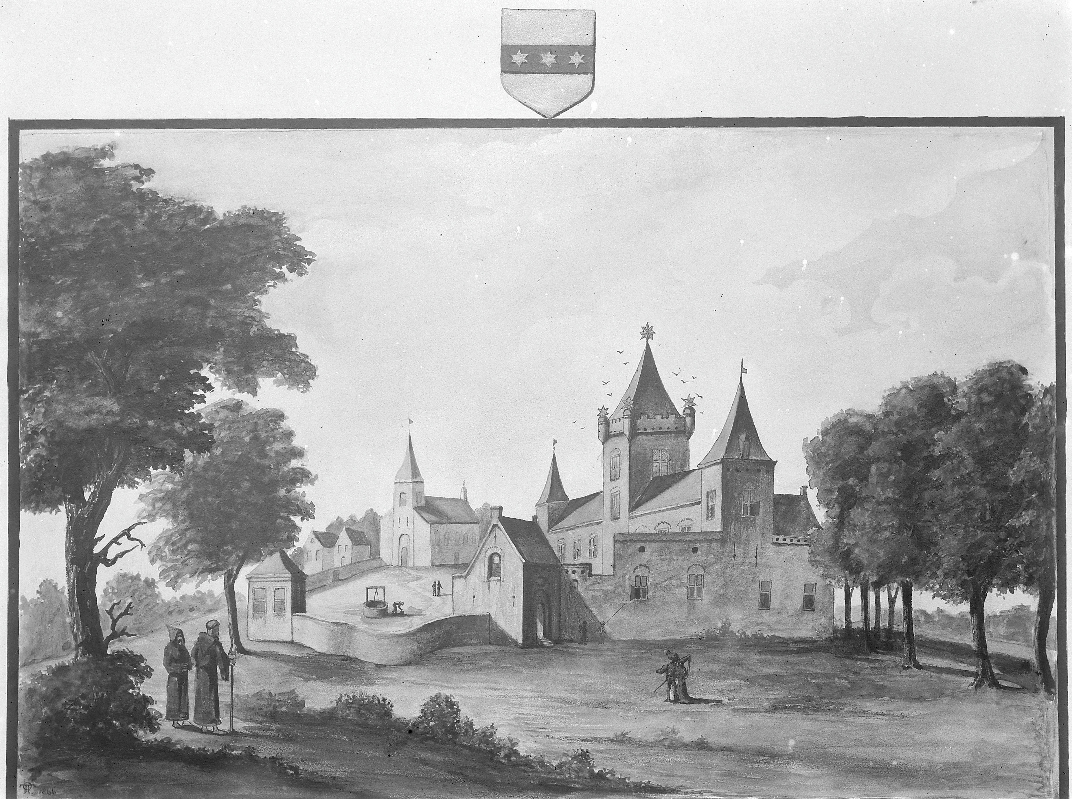 Slot Hillegersberg: Tekening van het slot